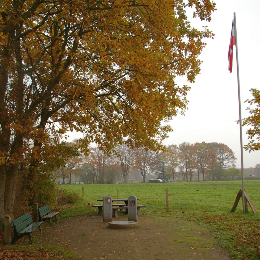 Geografischer Mittelpunkt von Schleswig-Holstein